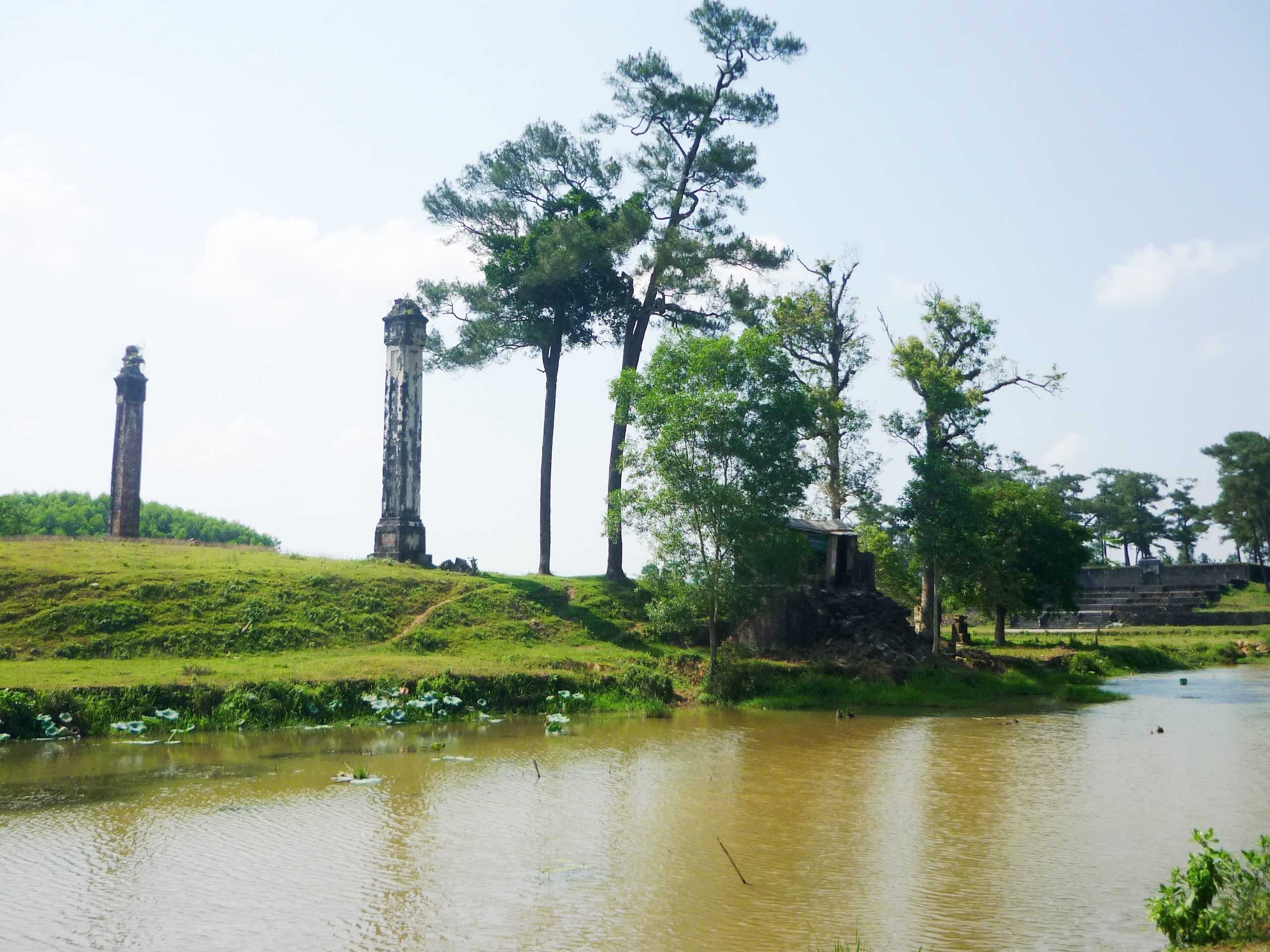 Thể loại:Nhà Nguyễn Thể Loại:Di tích cố đô Huế Thể loại:Lăng tẩm các Vua chúa Nguyễn Thể loại:Di tích ngoài Kinh Thành Huế